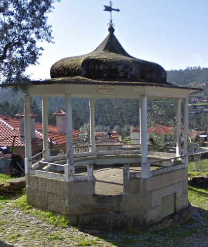 O coreto da aldeia de Carvalhal Redondo, denominada também por lugar das "Rochas", é uma estrutura com inspiração no estilo neoárabe.